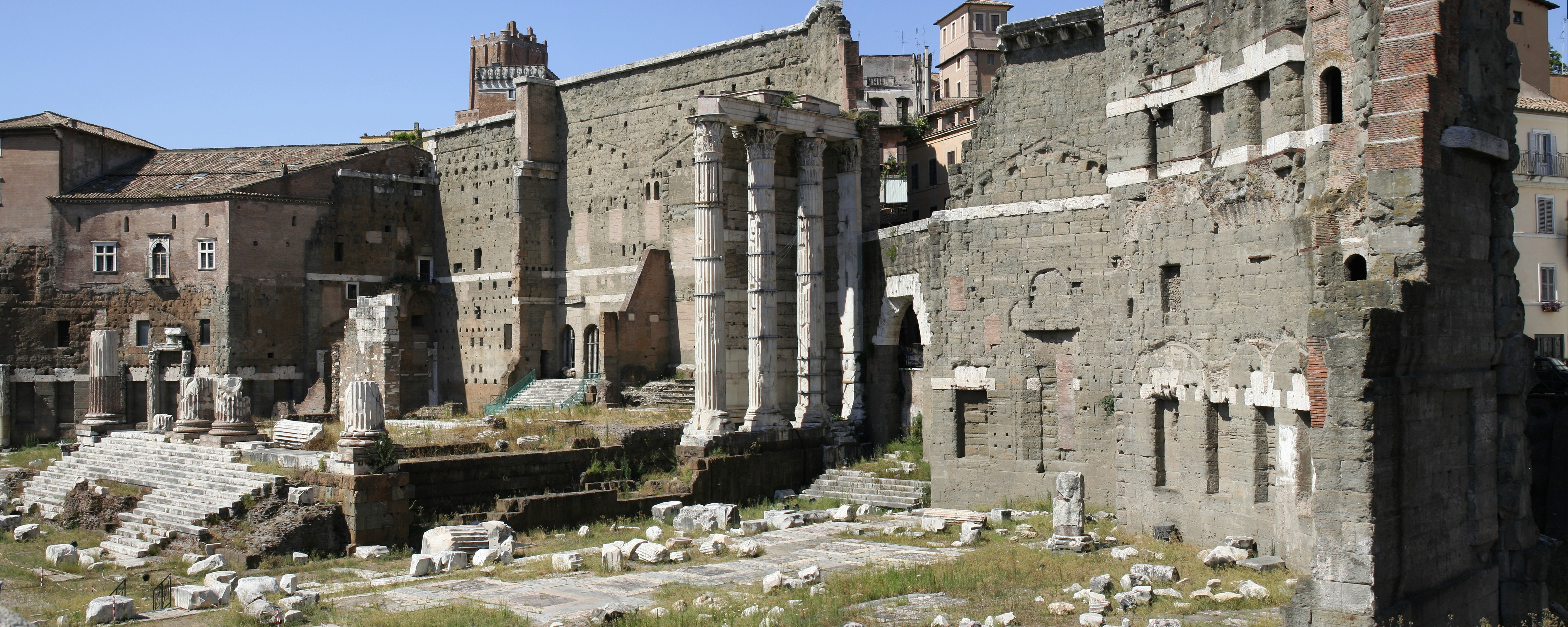 Panorama du forum d'Auguste.